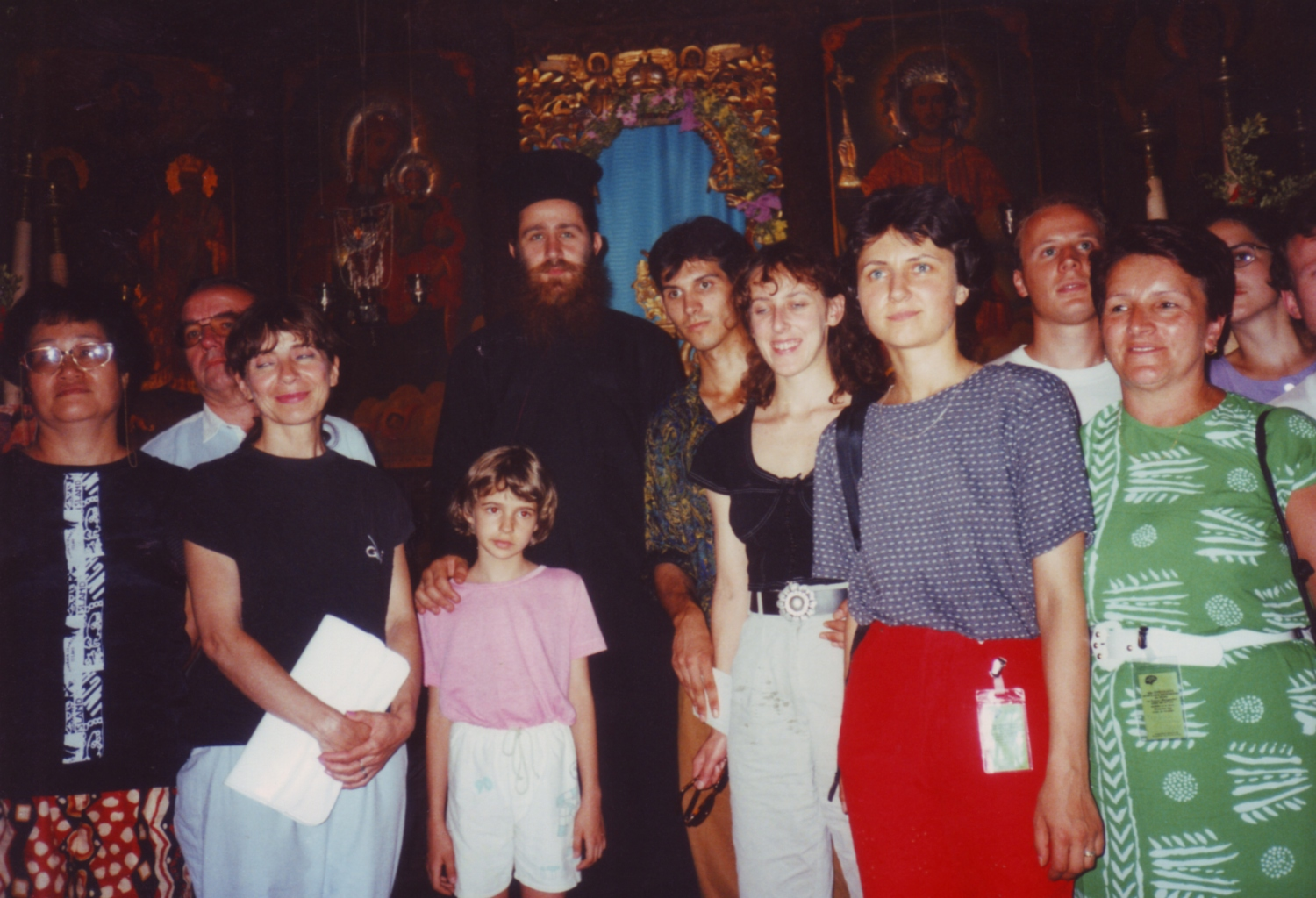 junaj esperantistoj diverslandaj en programero pri la bulgara ortodoksa eklezio kadre de la IJK 1993 en Vraca Kategorio:IJK 1993